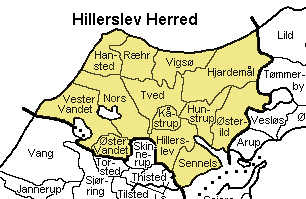 Hillerslev Herred, Thisted Amt Denmark Source: Map by Svend-Erik Christiansen